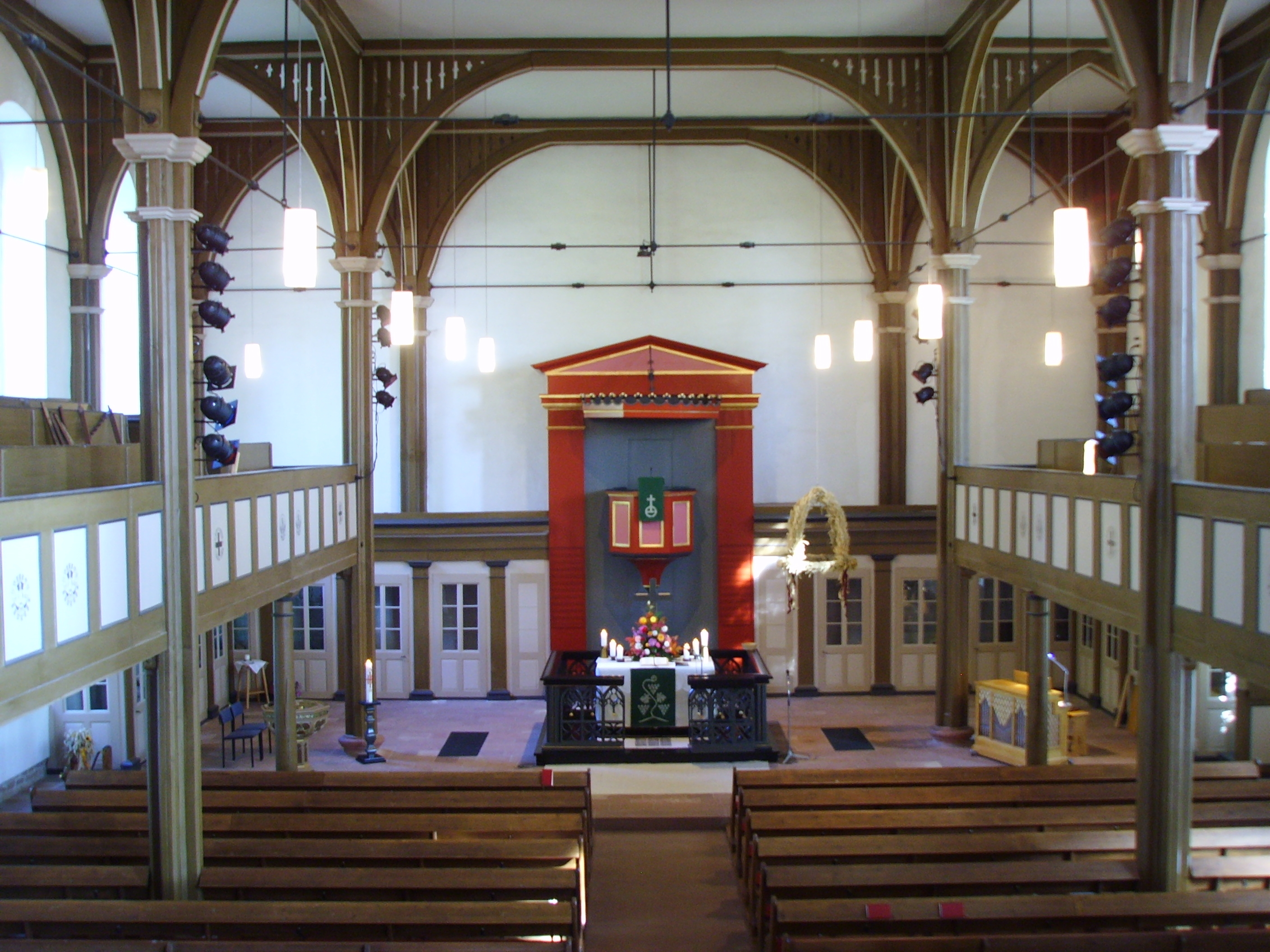 Bergkirche von Gründau-Niedergründau (Main-Kinzig-Kreis, Hessen);1838 bis 1840 im neoklassizistischen Stil erbaut, 1950 renoviert